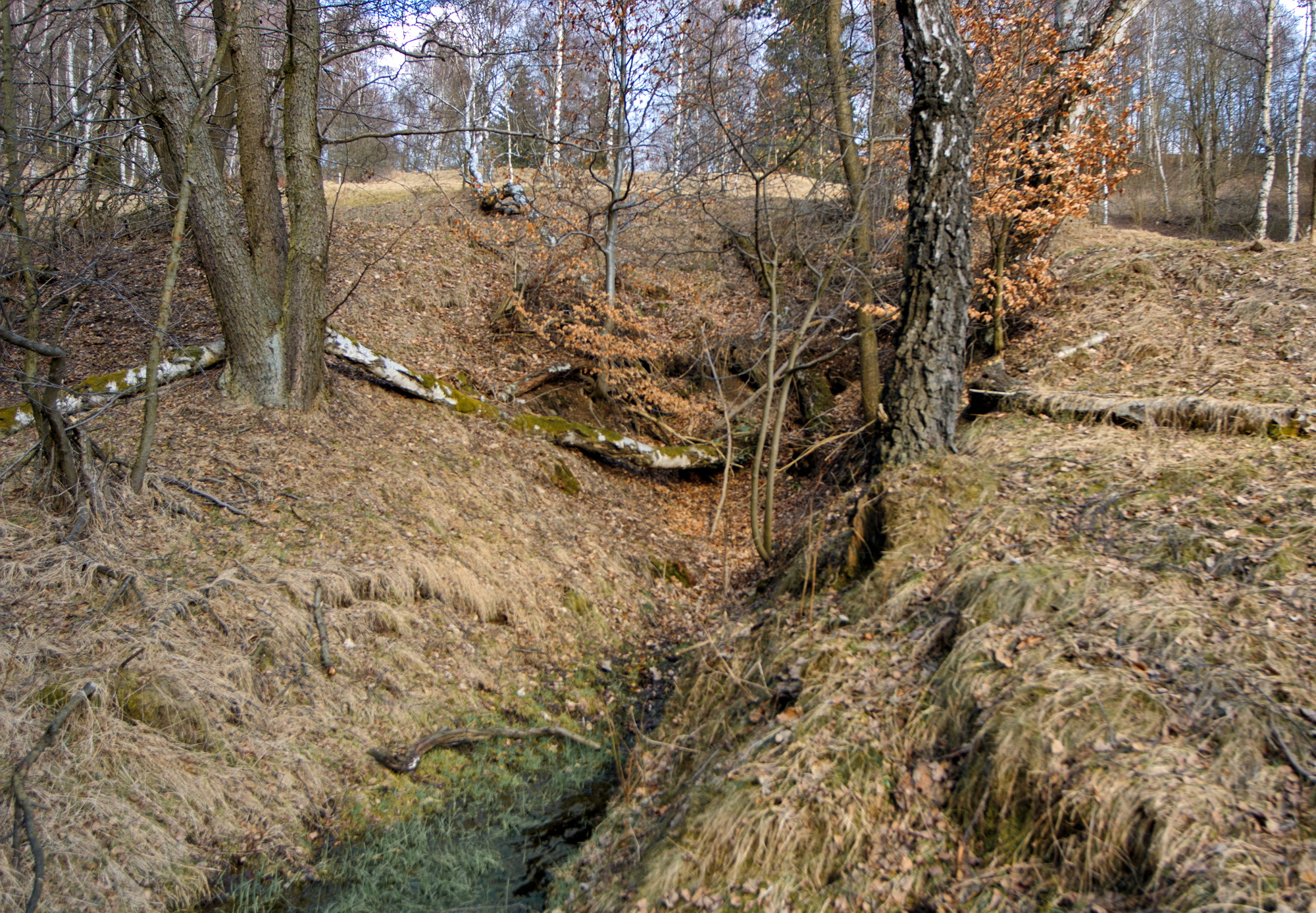 Bystřina (zaniklá osada ve Slavkovské lese) pod Rovnou, zavalené ústí staré štoly na polymetalické rudy, okres Sokolov